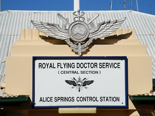 Base du Royal Flying Doctor Service of Australia à Alice Springs